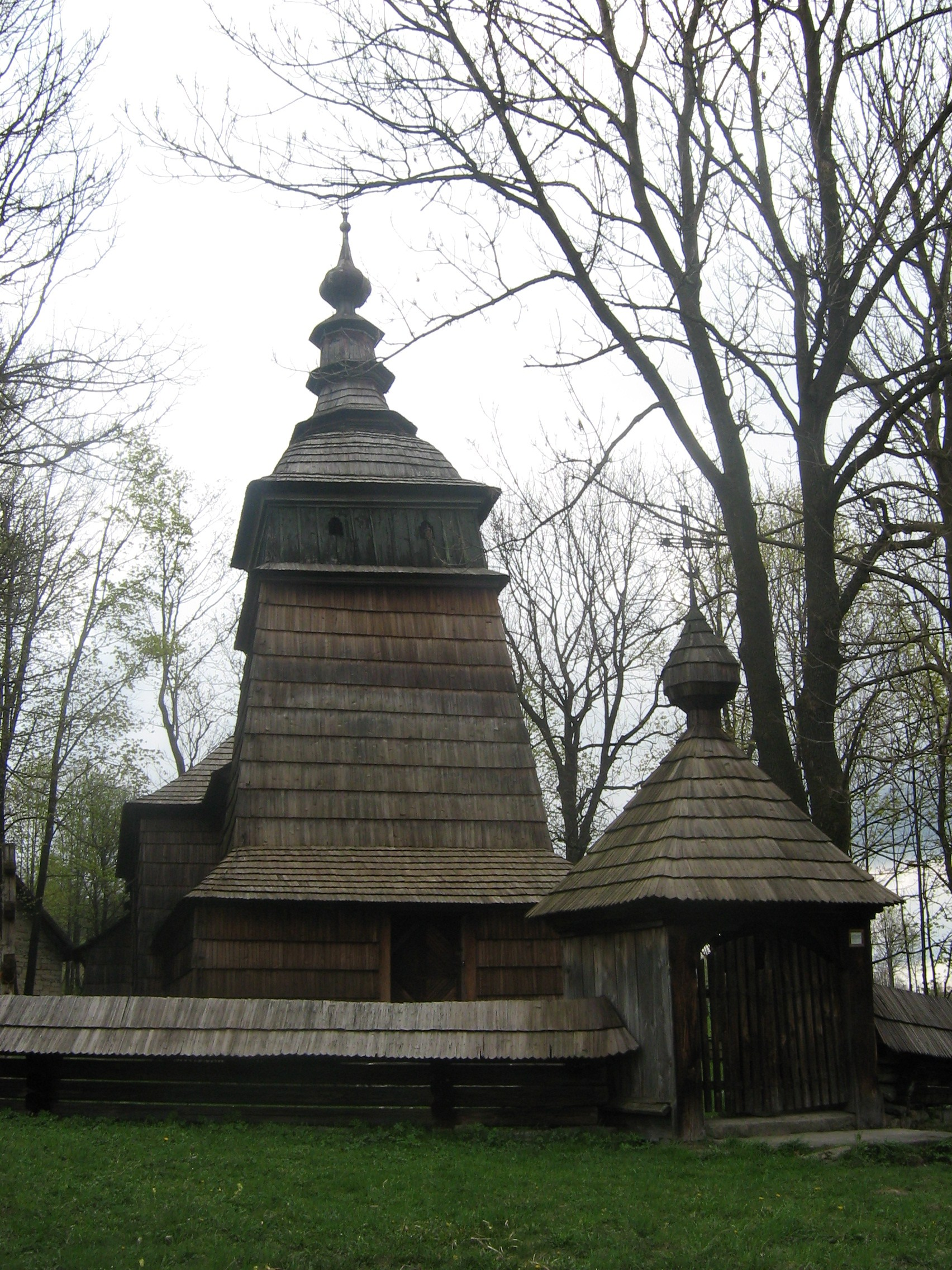 Greek Catholic Church of the Lemkos. Located in Bartne, Low Beskids, Poland. Cerkiew grekokatolicka w Bartnem (Beskid Niski). Jedna z cenniejszych cerkwi łemkowskich.